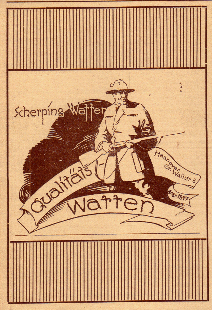 Mann mit Jagdausrüstung und Jagdgewehr; Druck einer Grafik des Kunstmalers Friedrich Karl Lippert mit der Künstersignatur F K L für „Scherping Waffen Qualitäts-Waffen Hannover Gr. Wallstr. 8 gegr. 1847“ Tatsächlich aber wurde das Unternehmen des späteren Hof-Büchsenmachers Scherping Waffen im Jahr 1857 gegründet. Diese an eine Anzeige oder ein kleines Plakat erinnernde Werbedruck stammt aus dem Jahr 1924 ...